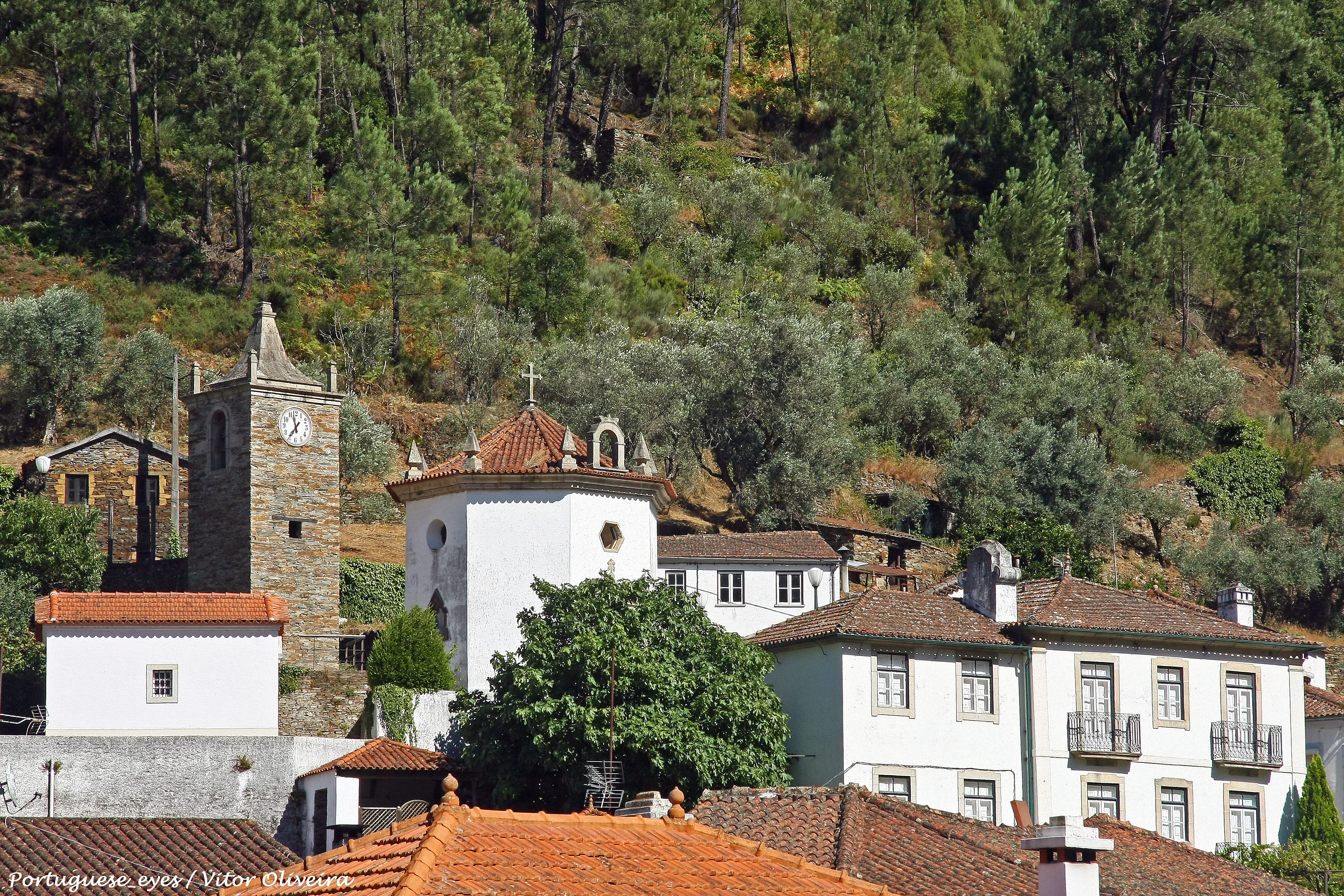 Começou por se chamar "Torre Salazar". Após o 25 de Abril a sua designação passou para "Torre da Paz". Mas na aldeia, até à intervenção de requalificação que recebeu em 2002, era meramente identificada por "Torre do relógio". Agora assume a sua singularidade porque, neste mundo, torres para promover a paz devem ser raras. Classificado como Imóvel de Interesse Municipal, é um edifício de planta quadrada com três metros de lado e 11 metros de altura. Na parte superior duas ventanas servem para alojar os seus dois sinos. A cúpula é em granito. O Sino da Paz O denominado “Sino da Paz” possui a seguinte inscrição "MANDOU FAZER DR. MÁRIO MATHIAS NO ANO DE 1945". Foi fabricado em Almada na firma "Manoel F. Couzinha". Pesa 6 kg e foi colocado na Torre da Paz em Abril de 1945. O seu destino ficou nele gravado sob a forma de uma inscrição: "ESTE SINO TOCOU PELA PRIMEIRA VEZ A ANUNCIAR O FIM DA GUERRA DA EUROPA EM 1945". O RELÓGIO É uma máquina, no seu todo, extraordinária. Várias peças do mecanismo exibem frases que enaltecem a Paz. Numa está gravado “BENDIGAMOS A PAZ”. Noutra “A PAZ SEJA COMNOSCO”. Construído por Manuel Francisco Cousinha, natural de Pomares - freguesia próxima de Benfeita - afamado relojoeiro da época, proprietário da casa "A BOA CONSTRUTORA", localizada em Almada. O povo da Benfeita soube primeiro Em 1945 o desfecho da guerra estava decidido. Todos esperavam o dia da rendição nazi, mas na aldeia e para todos os que a ela estavam ligados, a esse desejo juntava-se a ânsia de a torre e o sino cumprirem o seu objectivo. Nesta cumplicidade colectiva, um funcionário duma empresa inglesa, marido duma habitante da aldeia, soube da assinatura do armistício e logo telefonou para a Benfeita a dar a boa nova. Badaladas ecoaram por estes montes e vales e de imediato todos ficaram a saber que a Paz chegara.